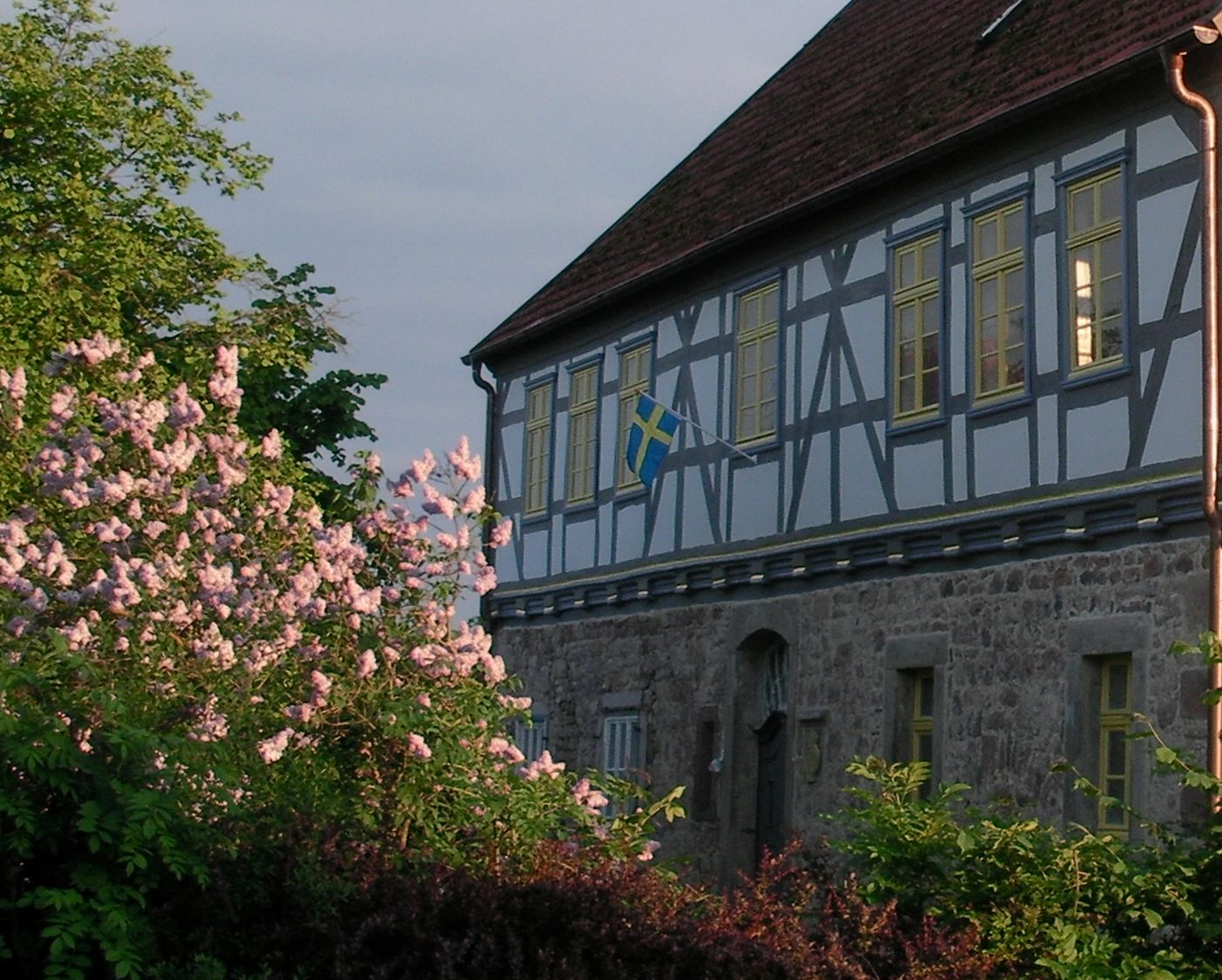 Jagdschloss Holzheim in Haunetal-Holzheim, Hessen, Regierungsbezirk Kassel, Landkreis Hersfeld-Rotenburg, Vorderfront